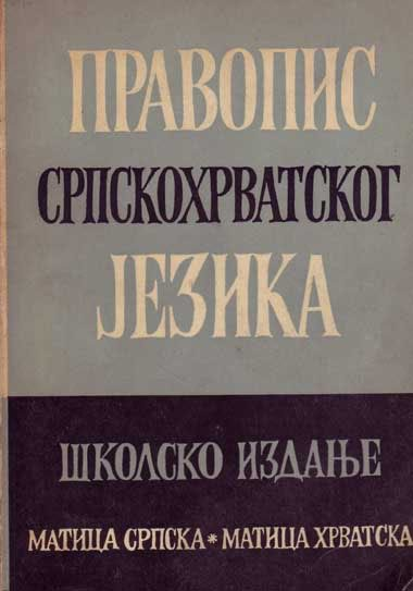 Srpskohrvatski / српскохрватски: Pravopis srpskohrvatskog jezika iz 1960. godine u zajedničkom izdanju Matice srpske i Matice hrvatske.